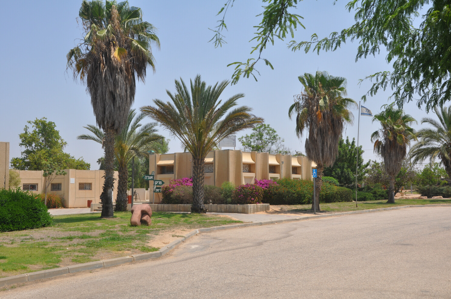 מוזיאון חבל ימית במושב דקל